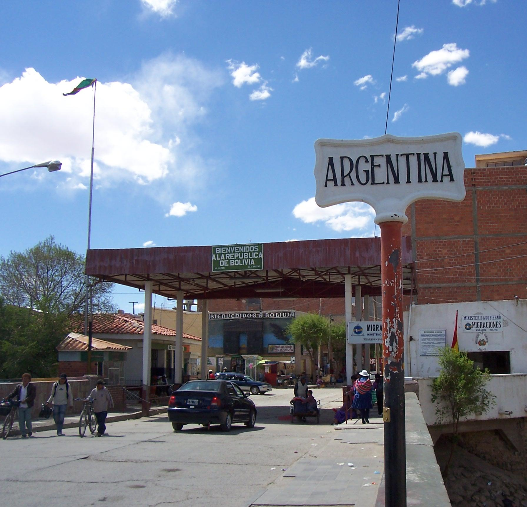 El Puente internacional Horacio Guzmán, que comunica a la ciudad de La Quiaca (Argentina) con la de Villazón (Bolivia).